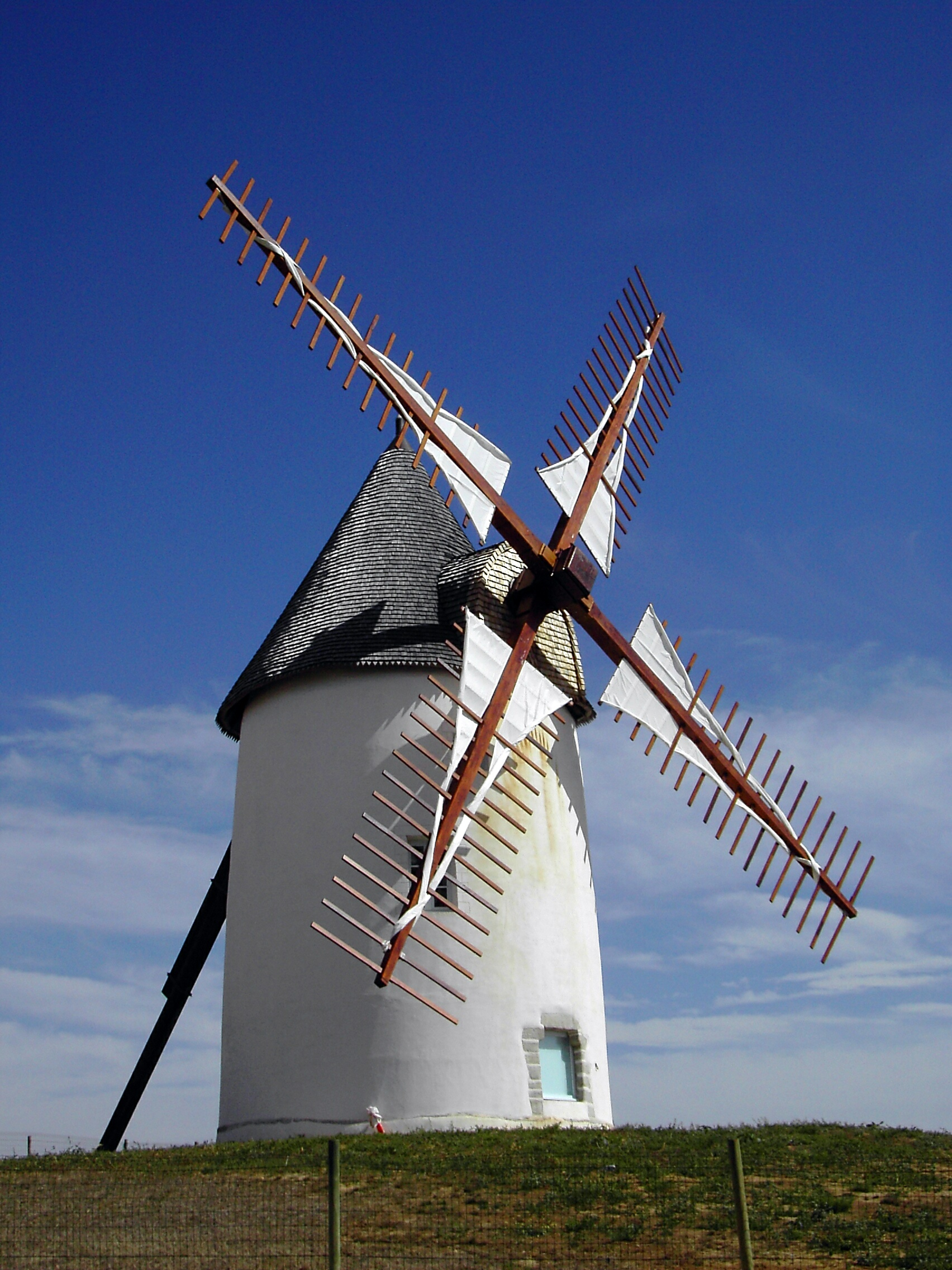 Jard-sur-mer Moulin á vent